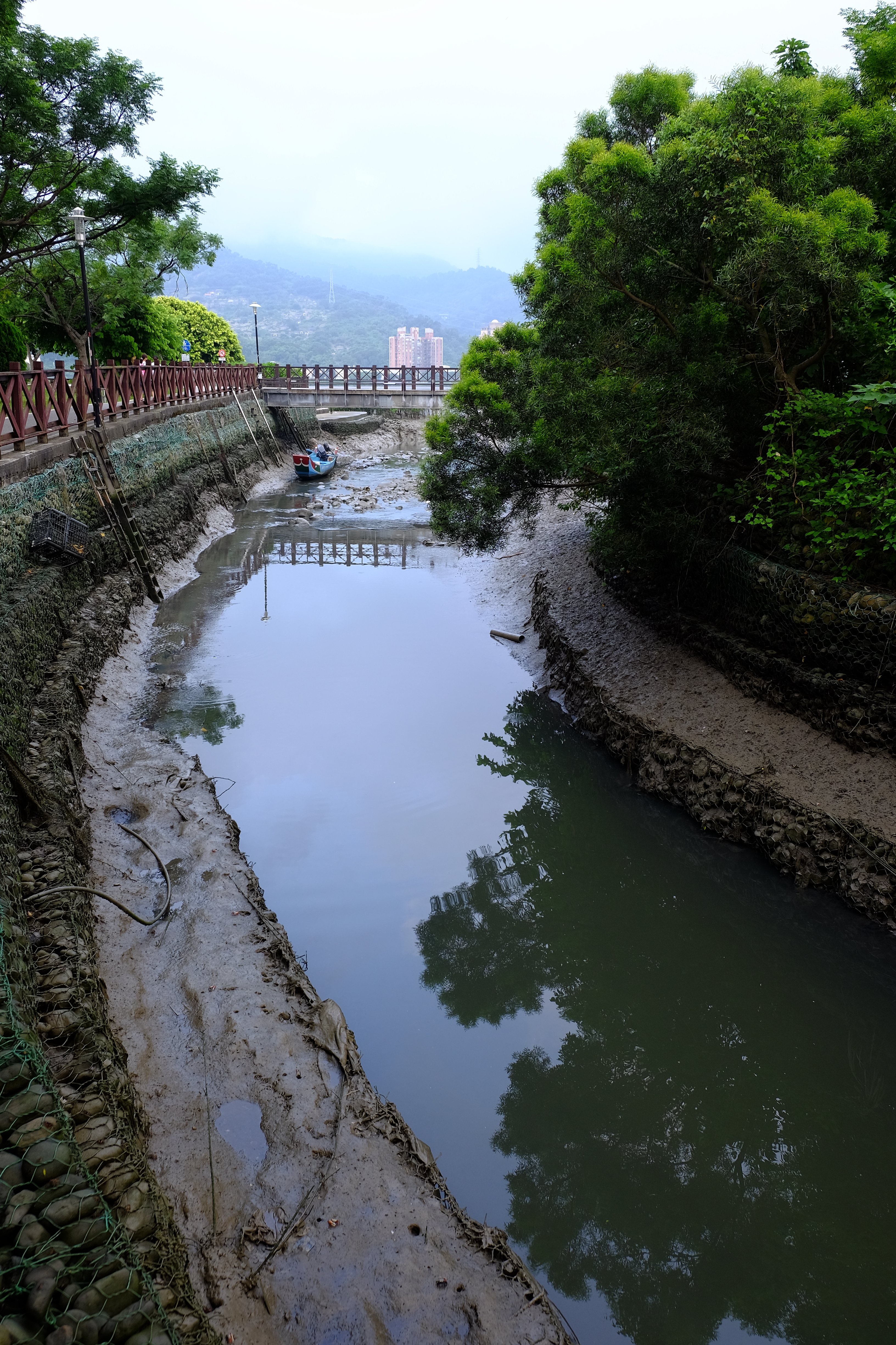 中文（台灣）: 樹梅坑溪注入淡水河處